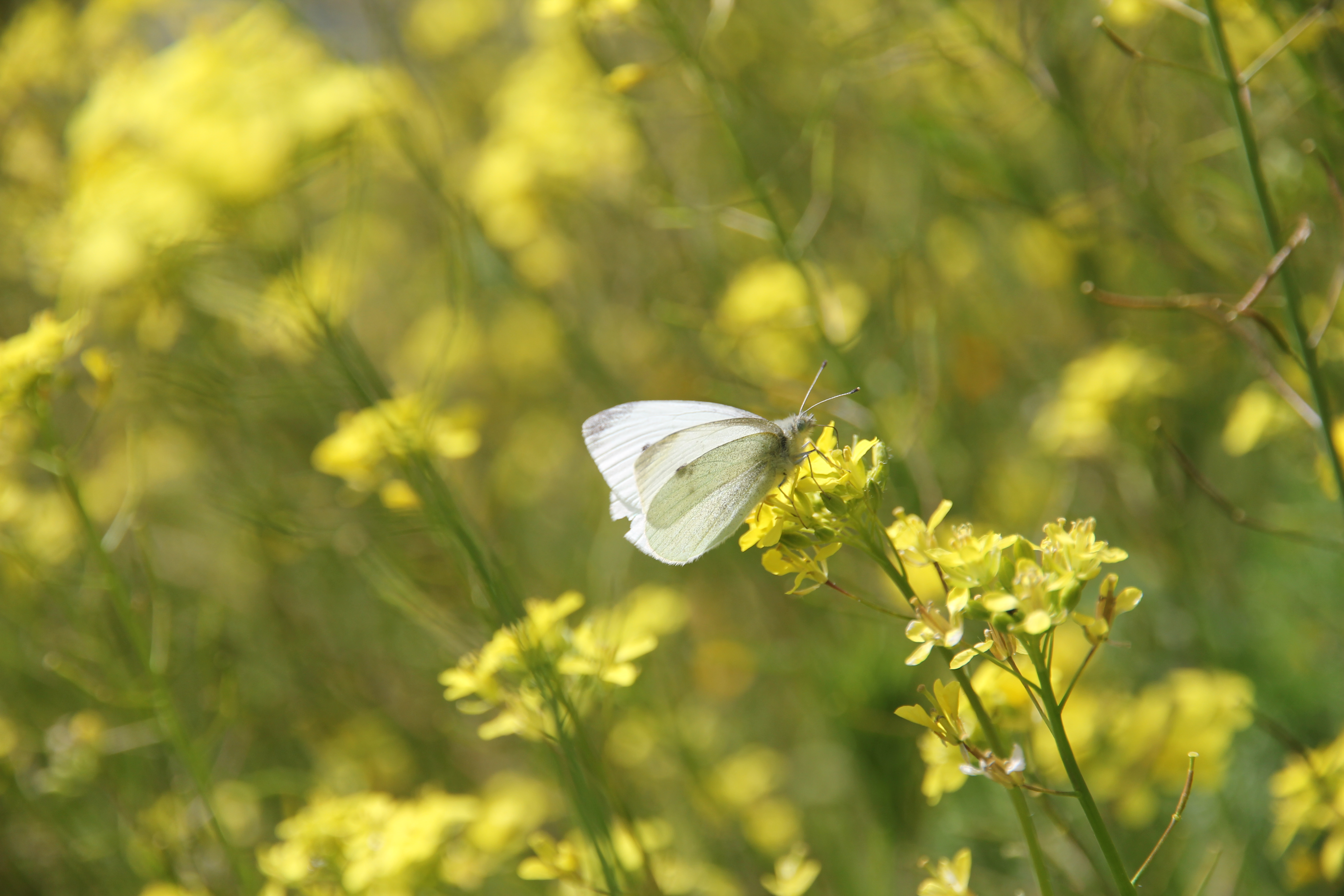 Cuenca del río Manzanares El Pardo Blanquilla de la col (Pieris rapae) This is a photography of a Site of Community Importance in Spain with the ID: ES3110004. Natura2000 entry, EEA entry